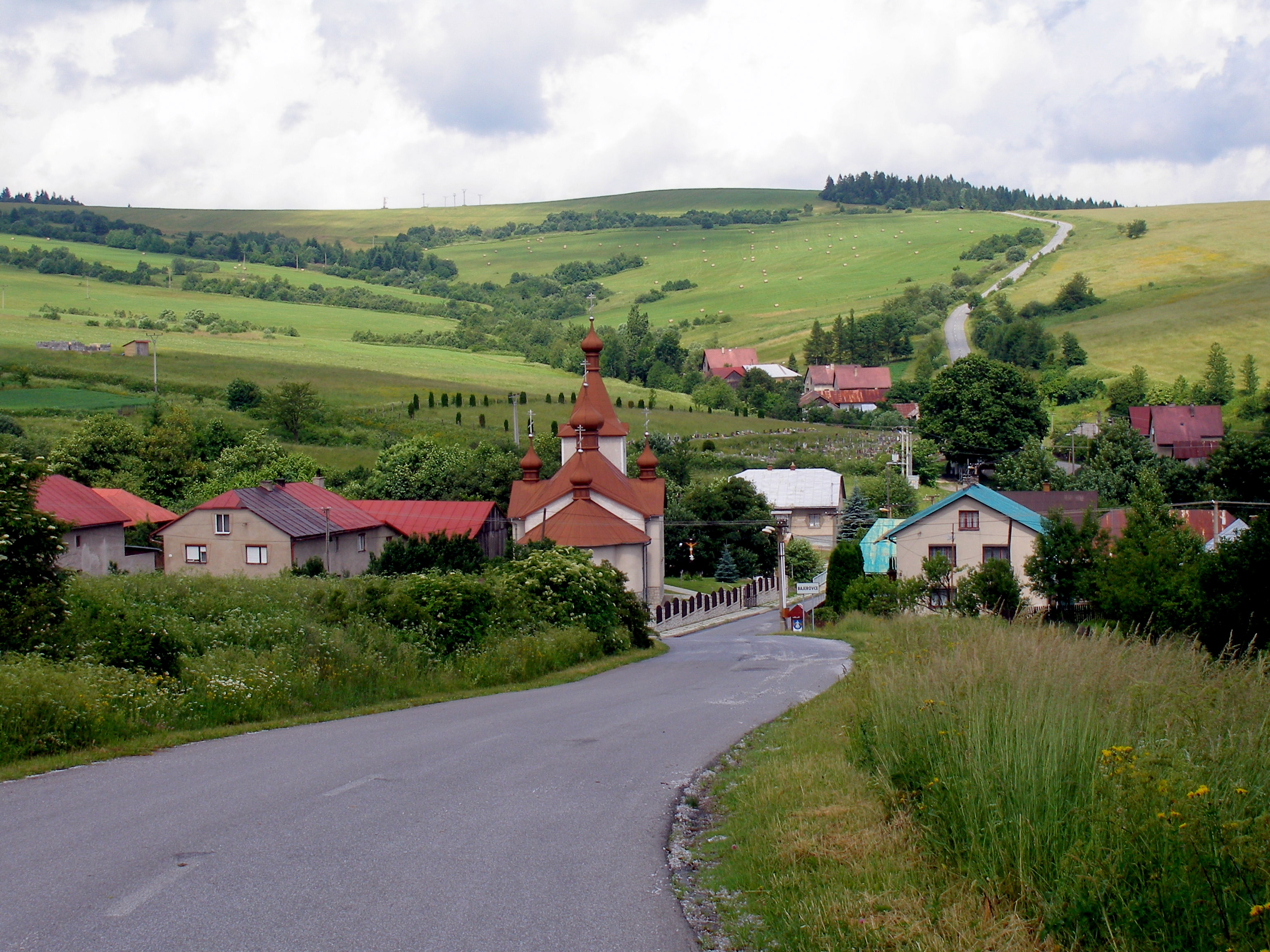 Obec Bajerovce okres Sabinov